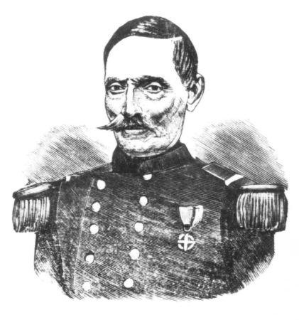 Griechischer Politiker, 19. Jahrhundert